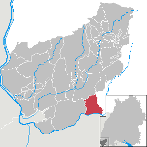 Schwörstadt, Landkreis Lörrach, Baden-Württemberg